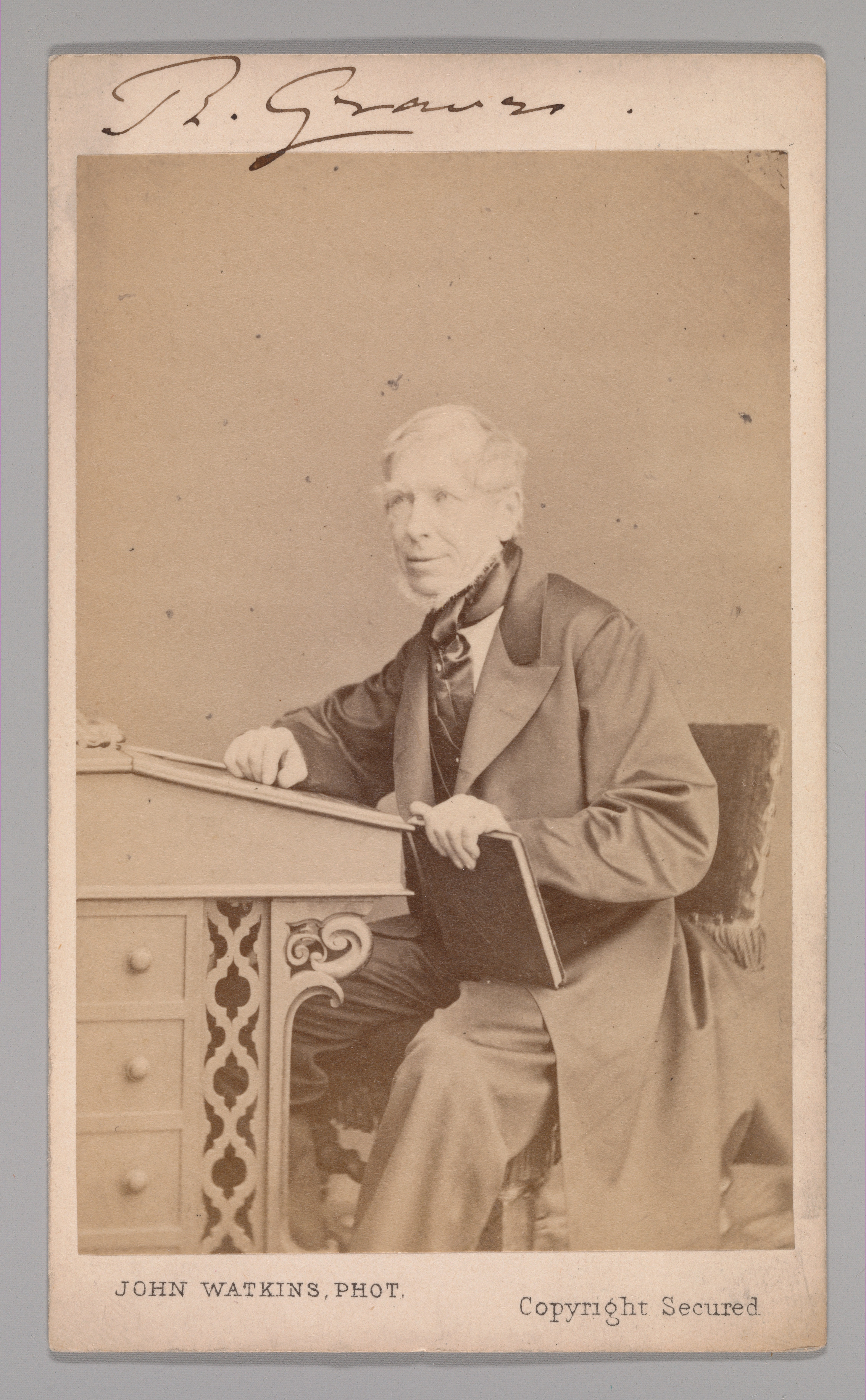 Carte-de-visite; Photographs